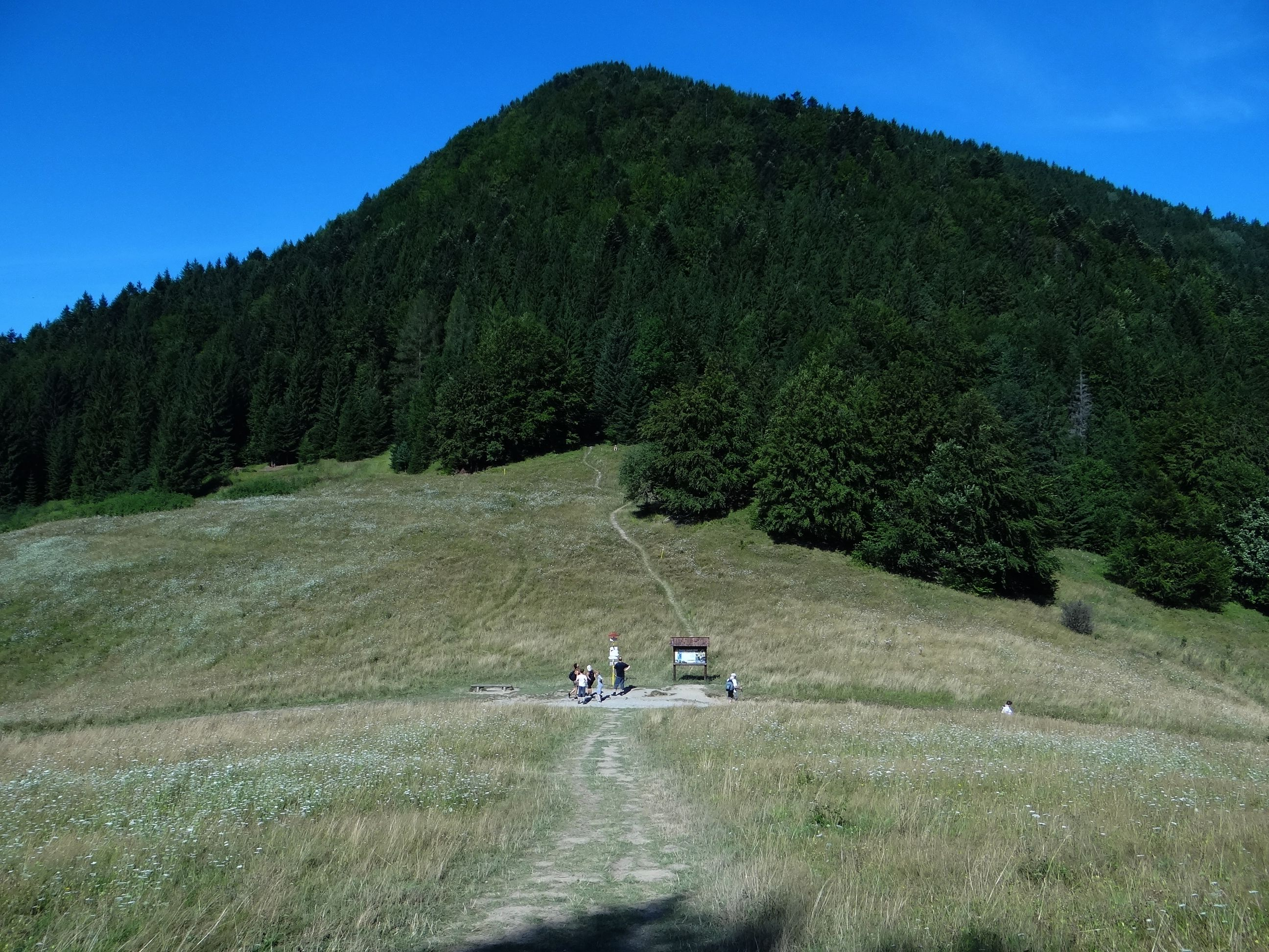 Vrchpodžiar